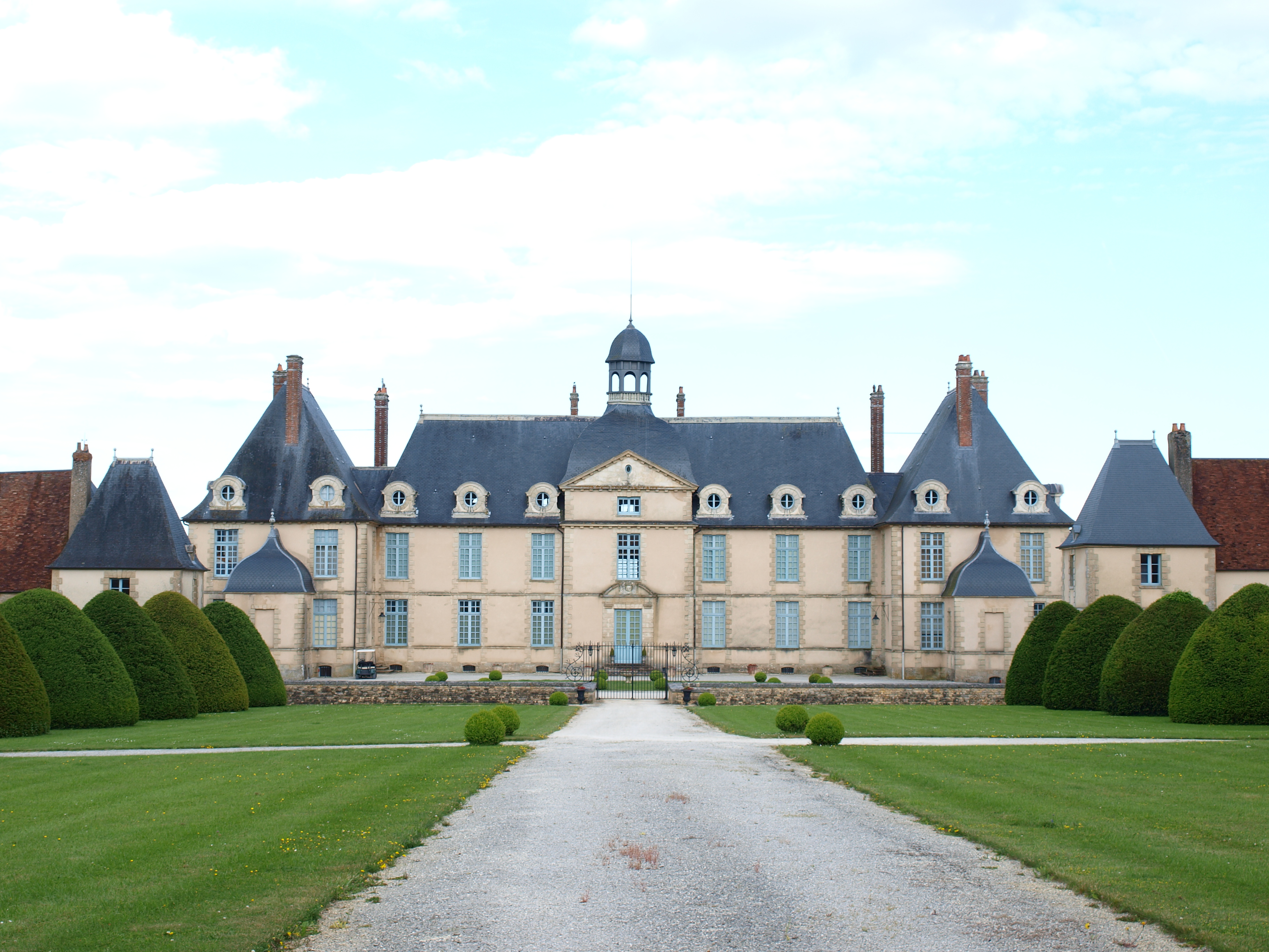 Château de Menou (Nièvre, France)